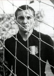 Il portiere di calcio italiano Valerio Bacigalupo.